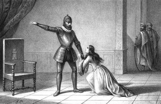 "Sampiero reproche à sa femme sa trahison et prononce son arrêt de mort".